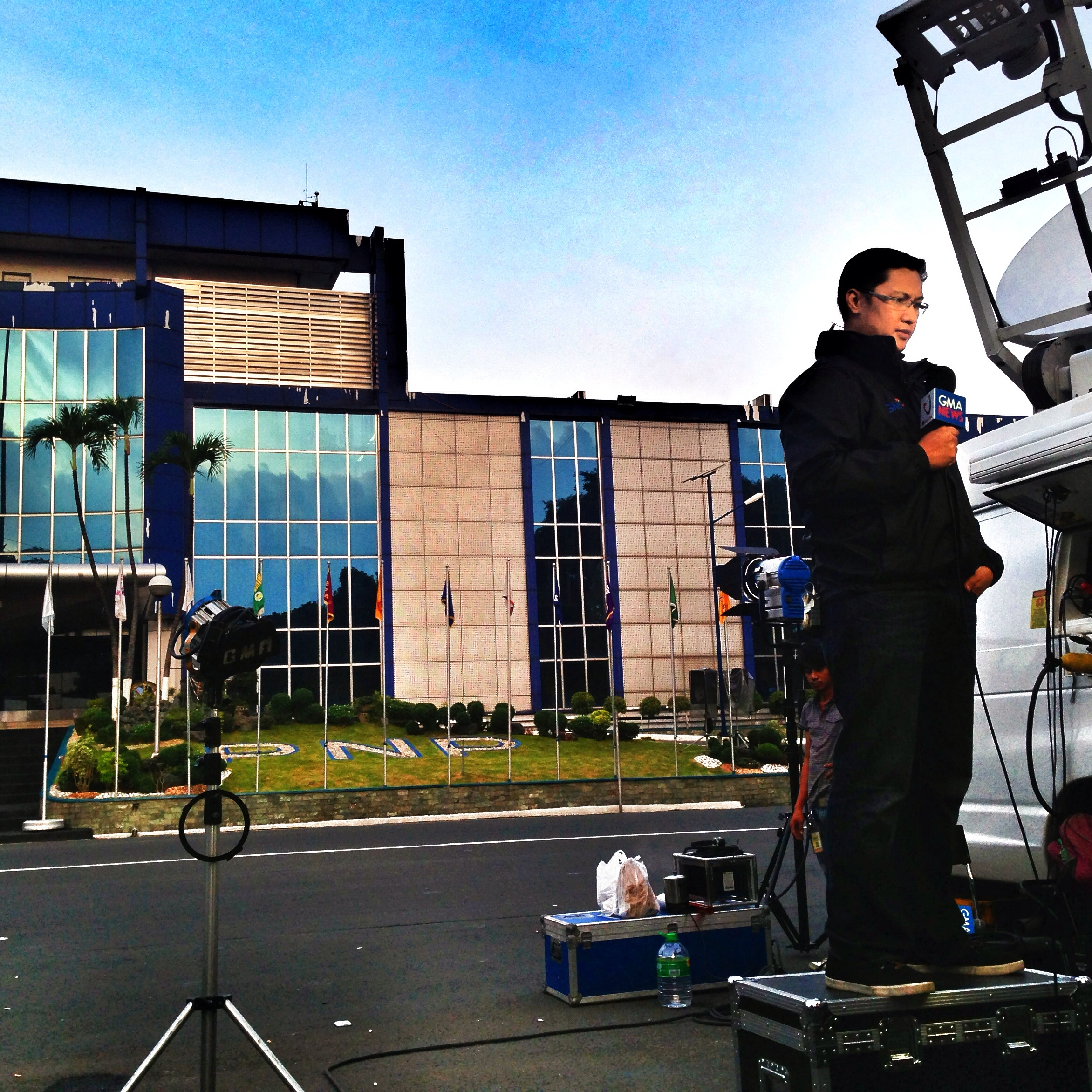 Oscar Oida, reporting